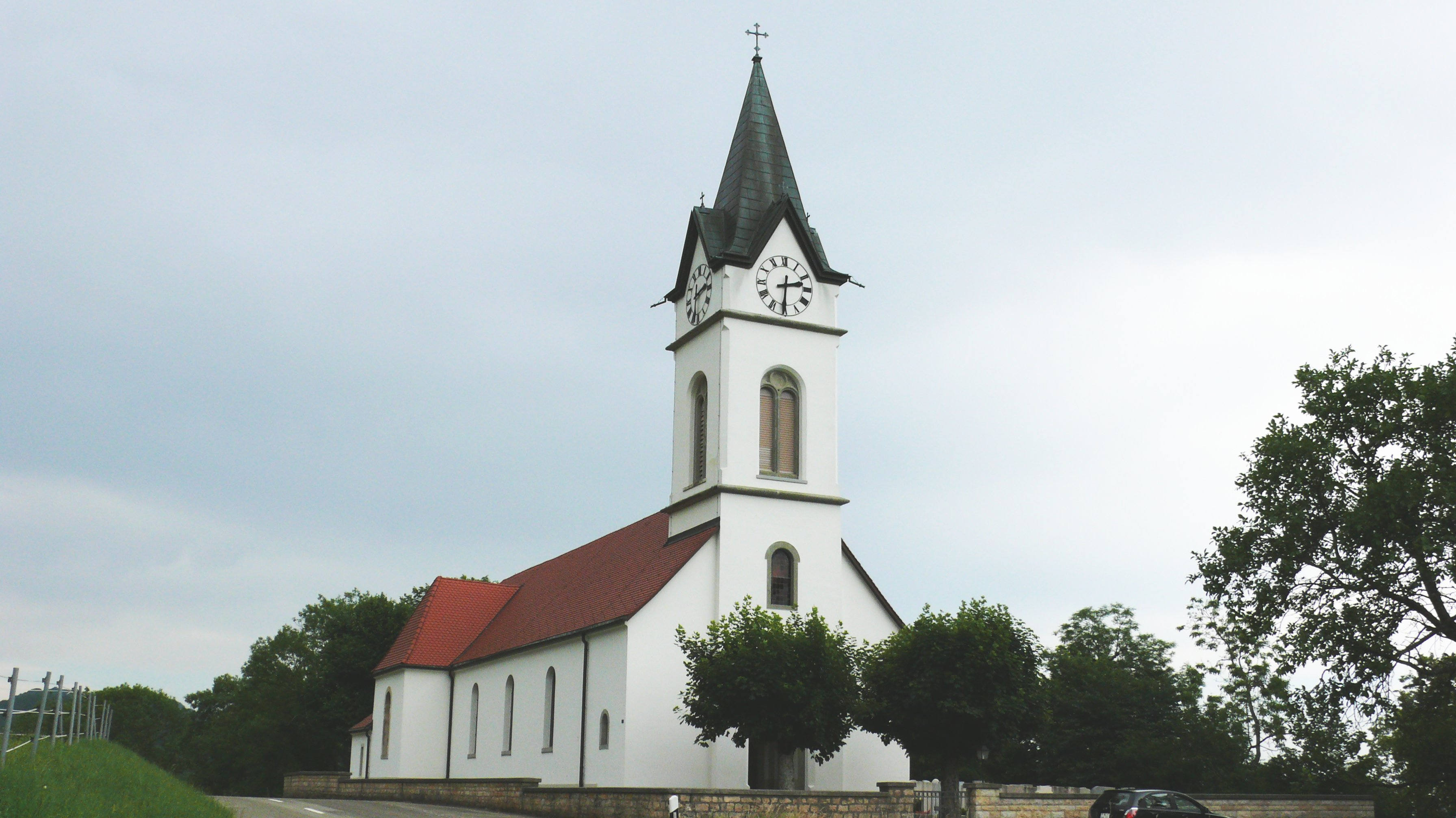 Schweiz Solothurn Ifenthal Kirche